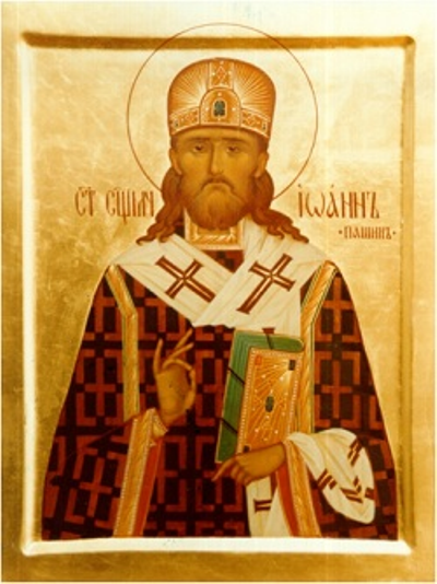 Іаан (Пашын). Абраз